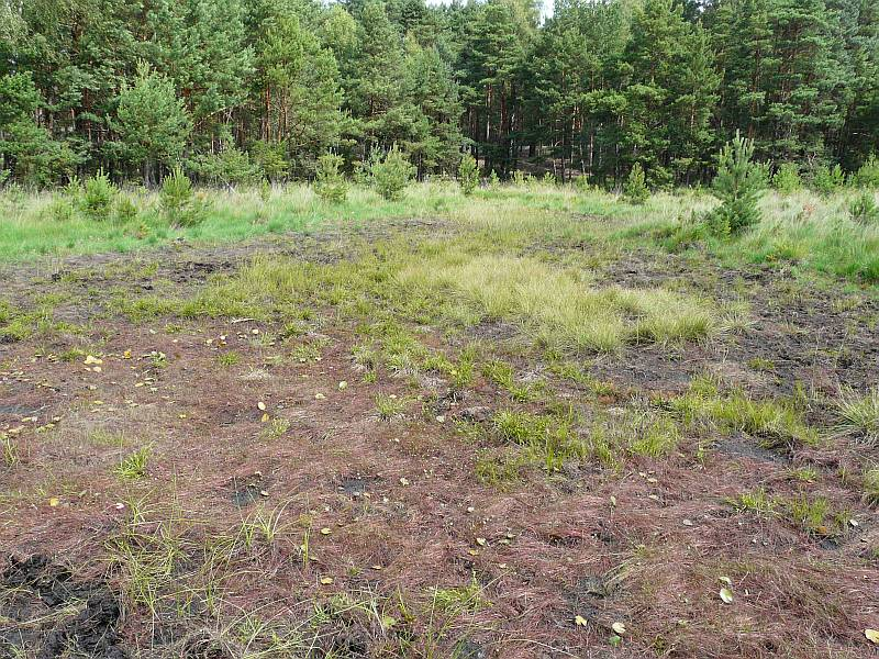 Użytek ekologiczny Bagna przy Rabym Kamieniu2